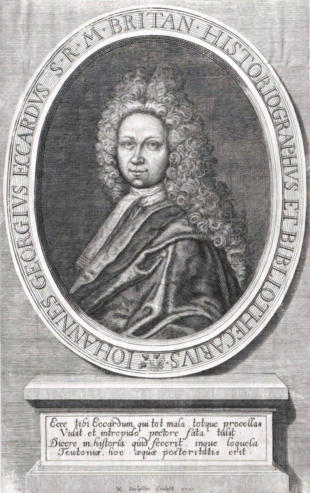 Johann Georg von Eckhart (1664–1730)